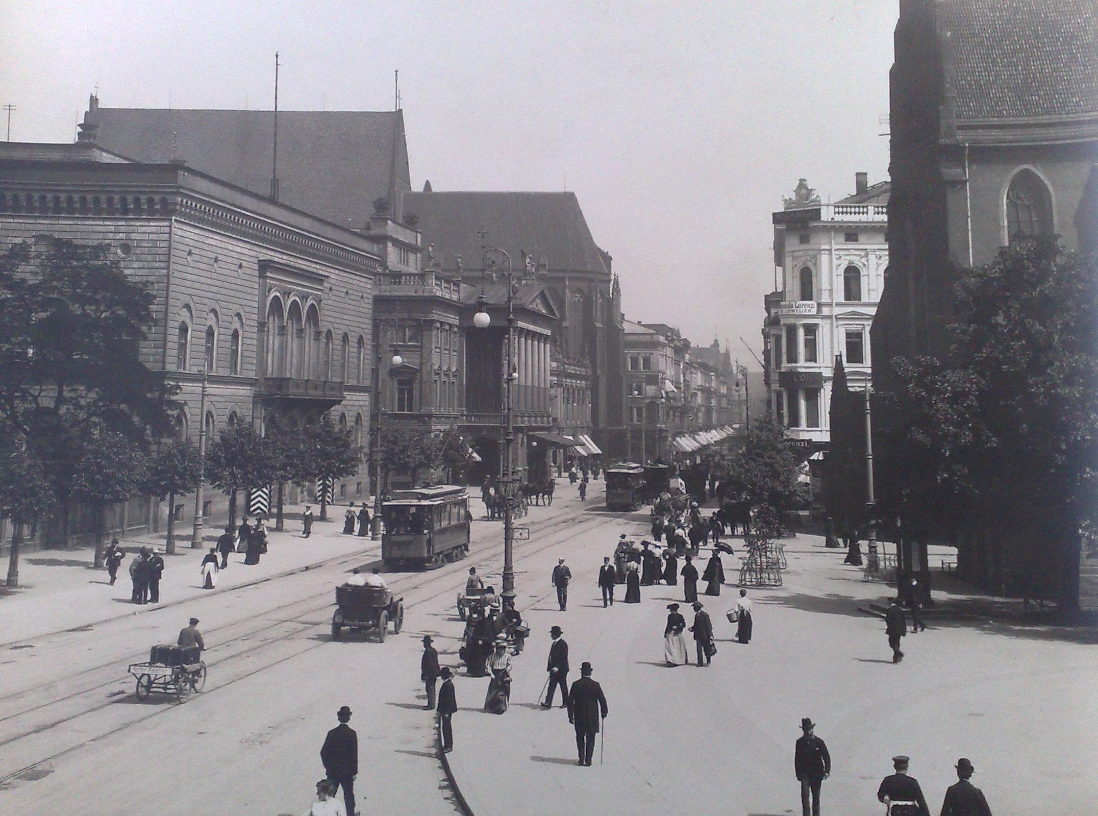 Breslau Schweidnizer Str